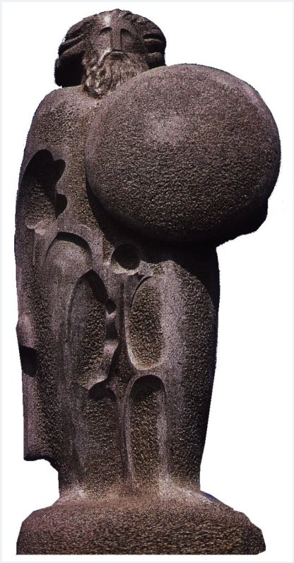 Estatua de Breogán, perto da Torre de Hércules (A Coruña)